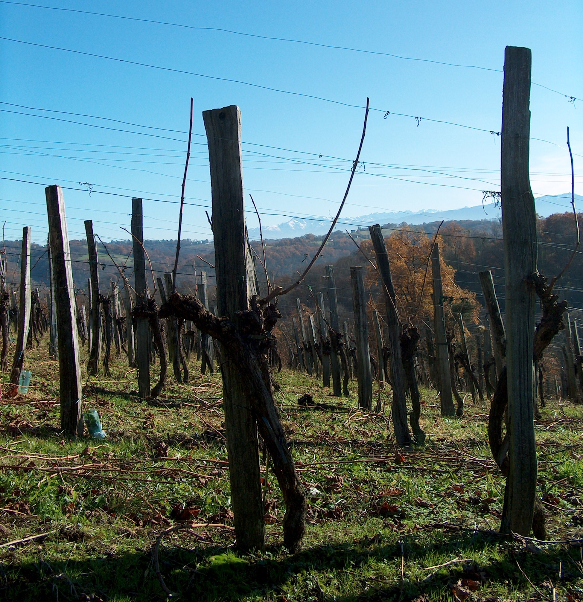 jurançon M.LAPASTOURE Saint-Faust 013